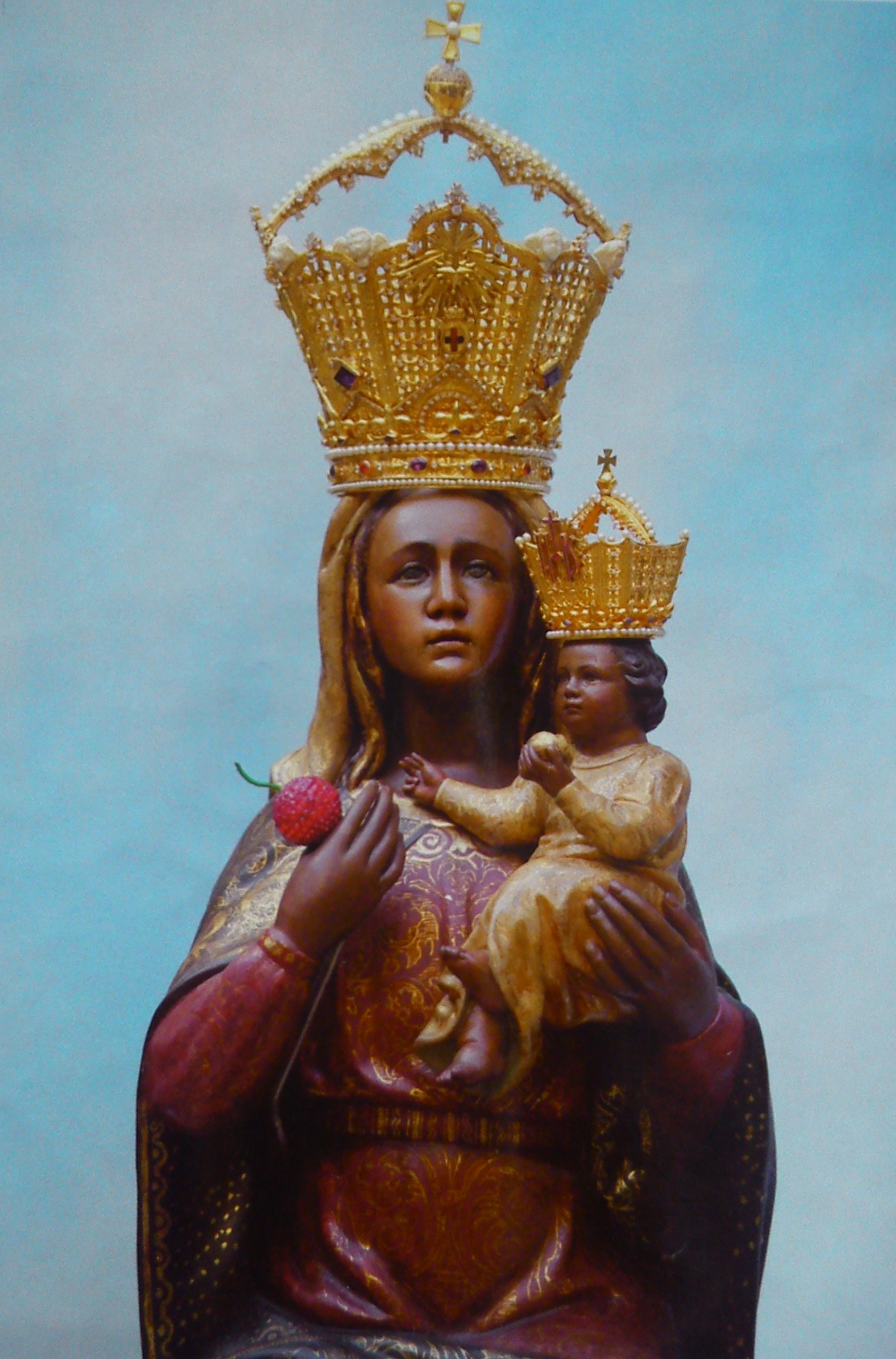 Vista de la talla de la Virgen de la Cabeza de Andújar.